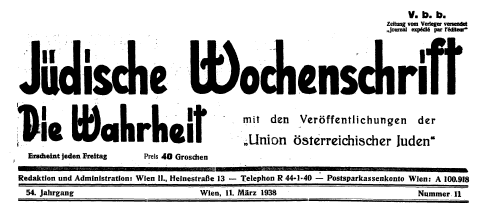 Titel der Wochenzeitung Die Wahrheit, Ausgabe vom 11. März 1938